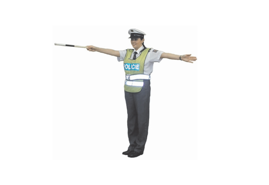 Signál „Stůj!“** (Příloha č. 9 k vyhlášce č. 30/2001 Sb. • Pokyny policisty při řízení provozu na pozemních komunikacích. Příloha č. 9 k vyhlášce č. 30/2001 Sb.) (Po rozvedení:**) “Stůj!“ • Pro řidiče přijíždějící směrem k zádům a pravému boku policisty.“Volno“ 1. Pro řidiče přijíždějícího směrem k levému boku policisty odbočující vpravo nebo vlevo. 2. Pro řidiče přijíždějícího směrem k čelu policisty, pokud odbočuje vpravo. 3. Pro chodce přecházející za zády policisty. ———————————————————————————— Jiný zdroj uvádí pojem "Trojstranná uzávěra". Signál „trojstranné uzávěry“ při řízení dopravy na křižovatce v České republice podle Pravidel provozu na pozemních komunikacích. Znamená "stůj" pro řidiče přijíždějícího k zádům a pravém boku policisty, "volno" pro řidiče přijíždějícího směrem k levému boku policisty odbočující vpravo nebo vlevo, "volno" pro řidiče přijíždějící směrem k čelu policisty a odbočující vpravo, "volno" pro chodce přecházející za zády policisty.